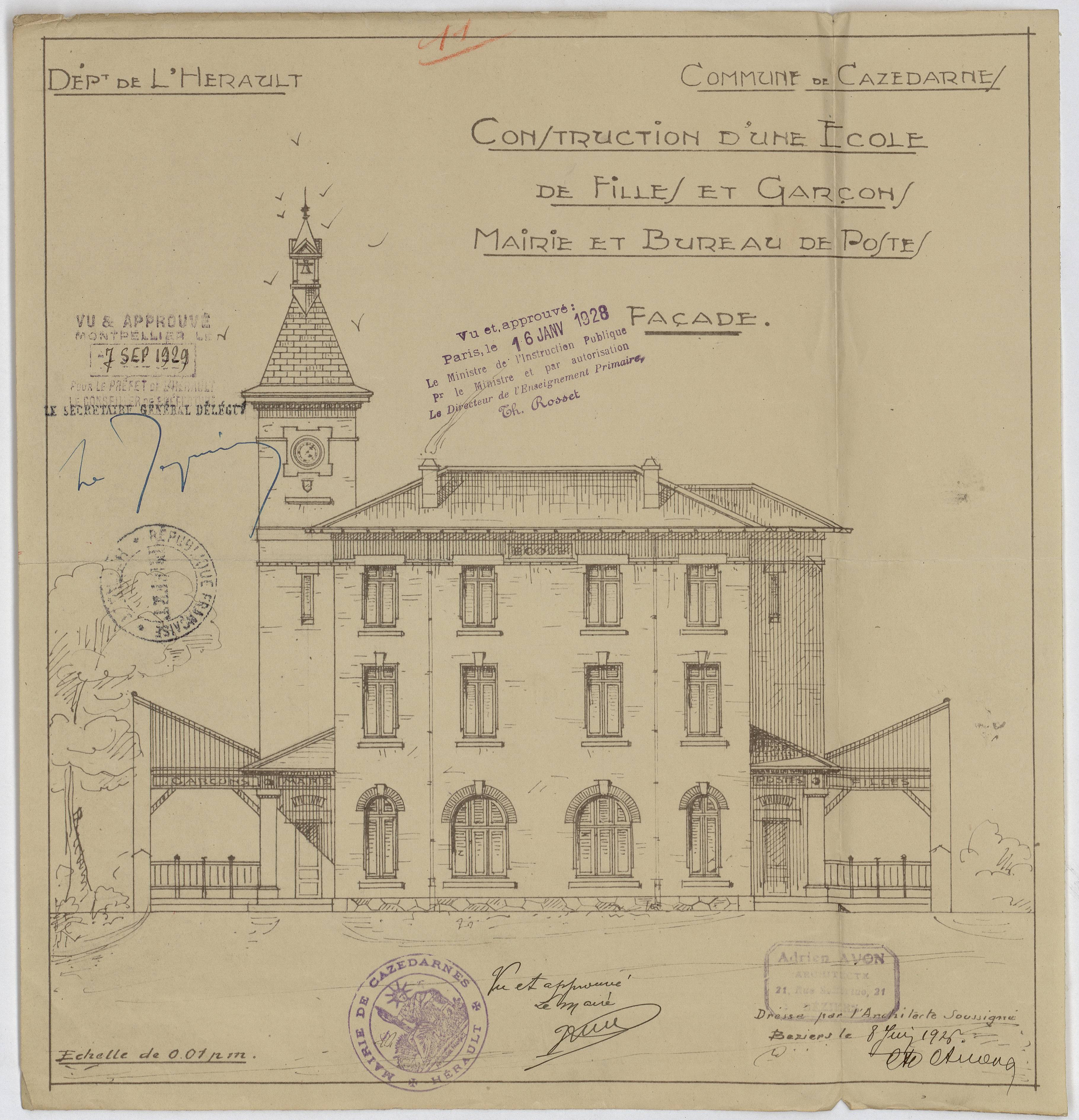 Cazedarnes. - Construction d'une école de filles et garçons, mairie et bureau de poste : façade.